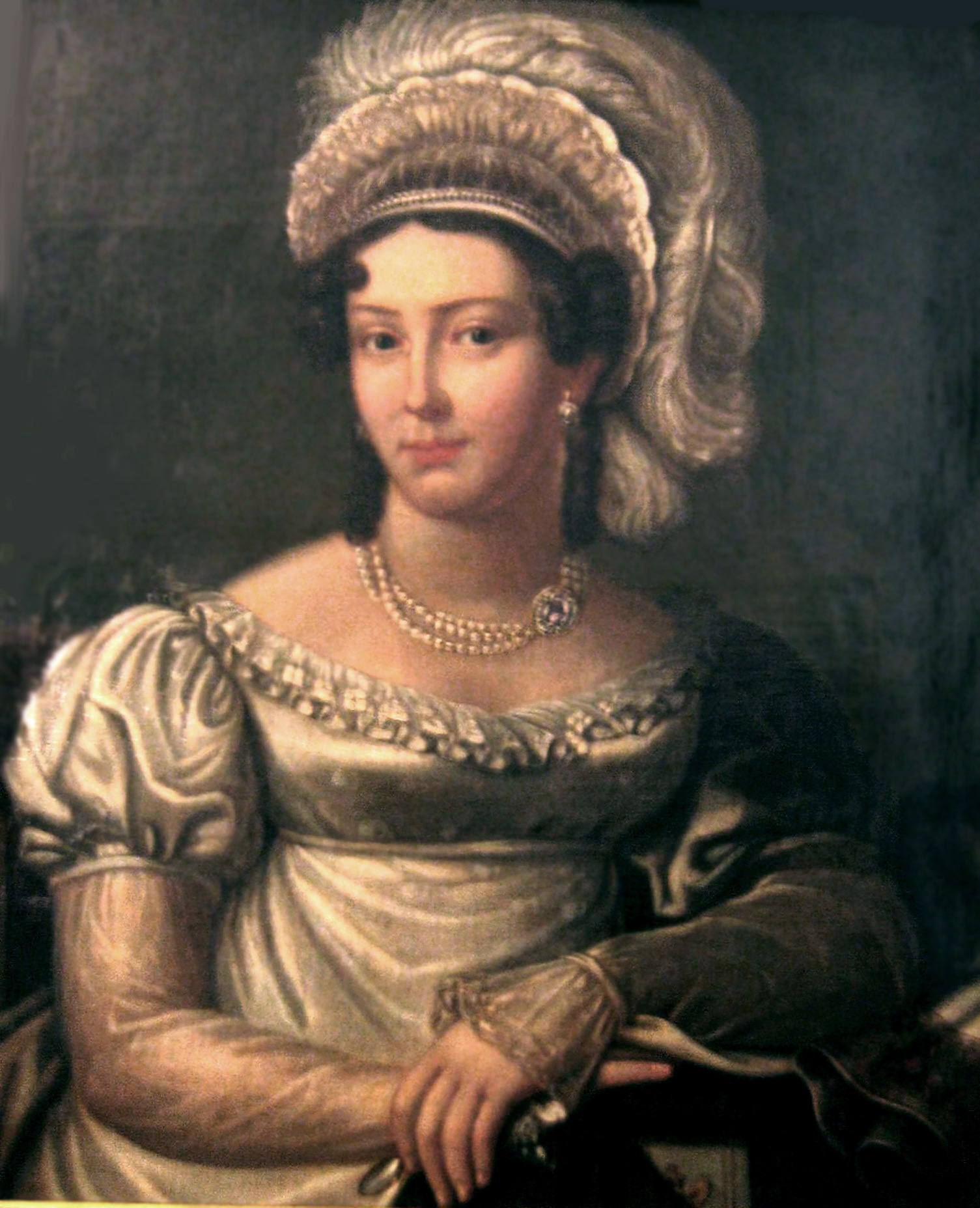 Joanna Grudzińska anonymous portrait before 1831 Image taken by User:Mathiasrex Maciej Szczepańczyk